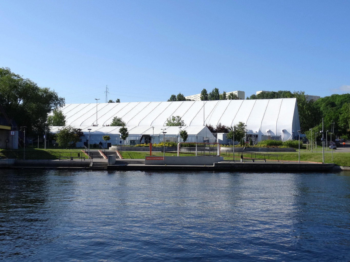 XXIII Międzynarodowe Targi Maszyn i Urządzeń dla Wodociągów i Kanalizacji WOD-KAN 2015 w Bydgoszczy